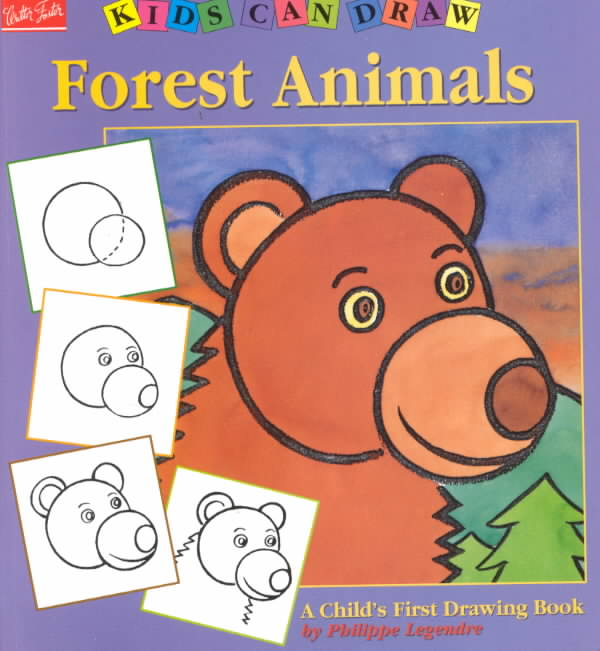 Illustration de couverture